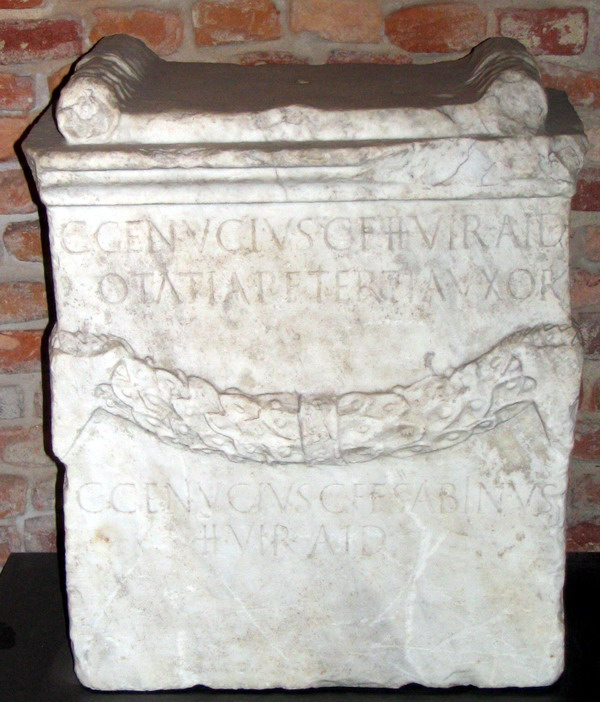 Museo di Sant'Anastasio Asti.